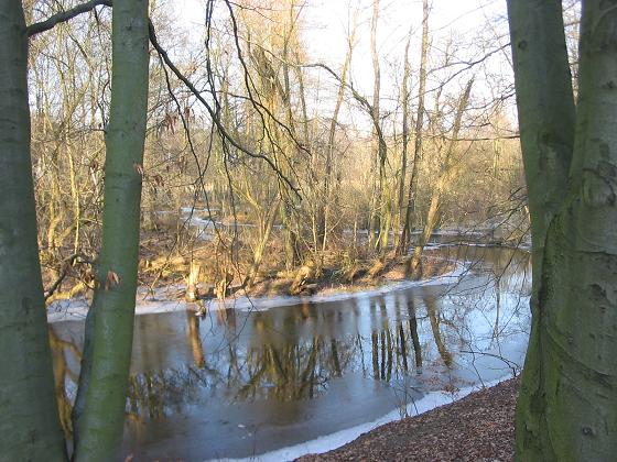 Tegeler Fließ, Berlin - Fotografiert im Februar 2005 von Lienhard Schulz